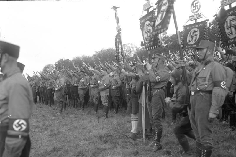 Hitler auf der Tagung der Nationalsozialisten in Braunschweig, Okt. 1931